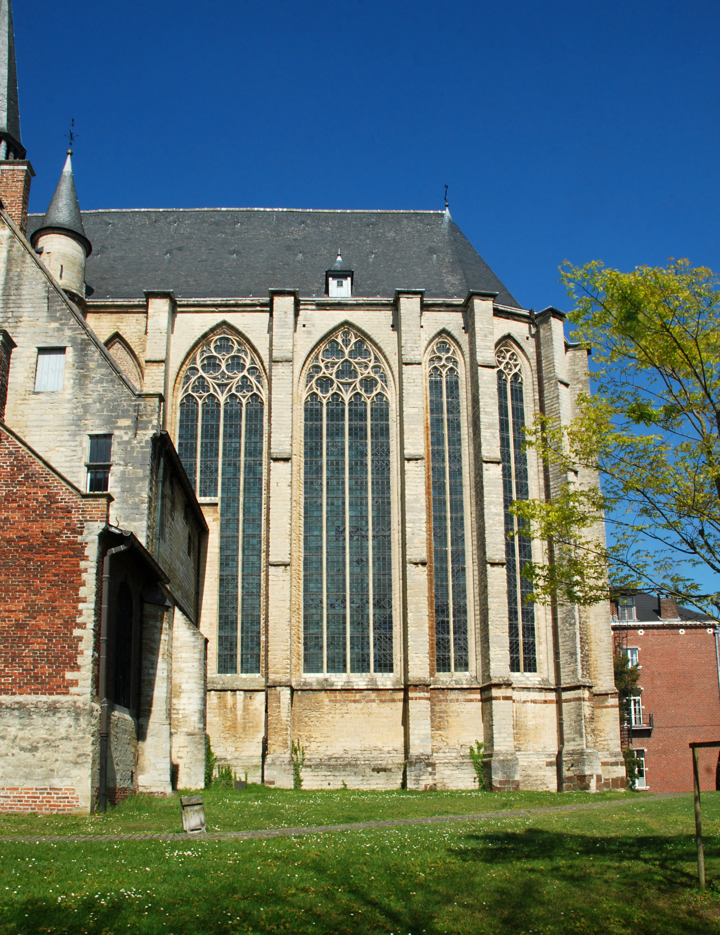 Belgique - Brabant flamand - Louvain - Église Saint-Quentin